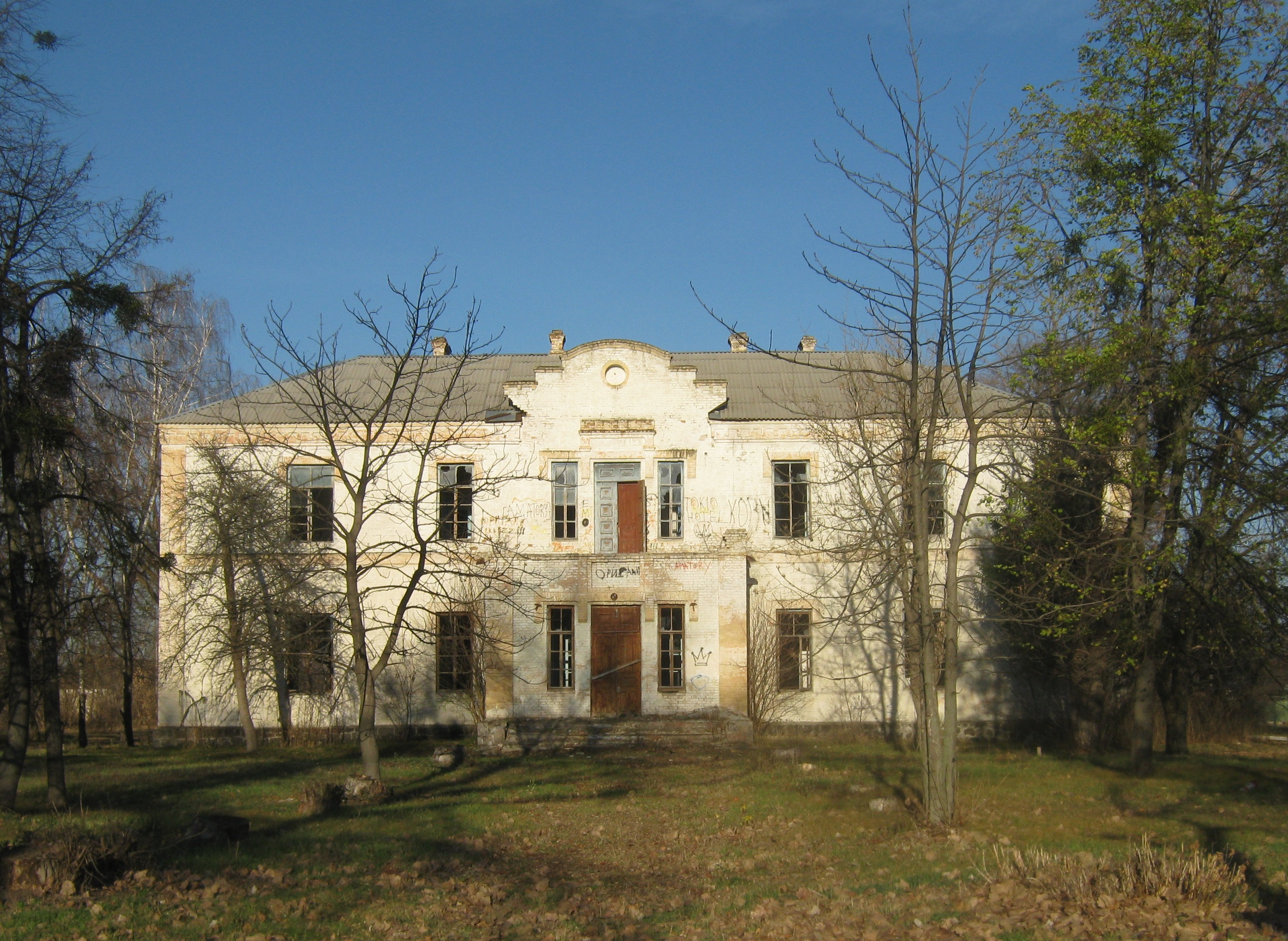 Еллінська школа в селі Мошни (Черкаська область, Україна) побудовано у 1901 році Катериною Балашовою.